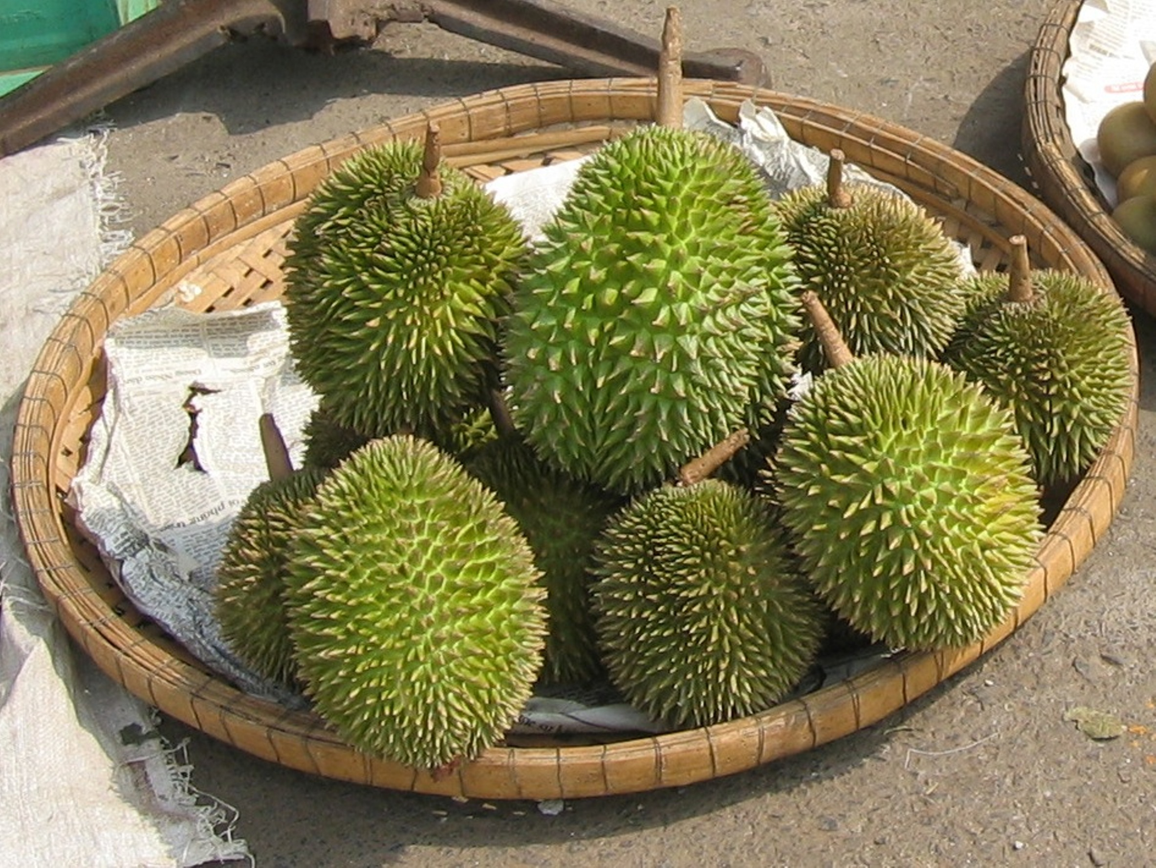 Durians Markt Thailand